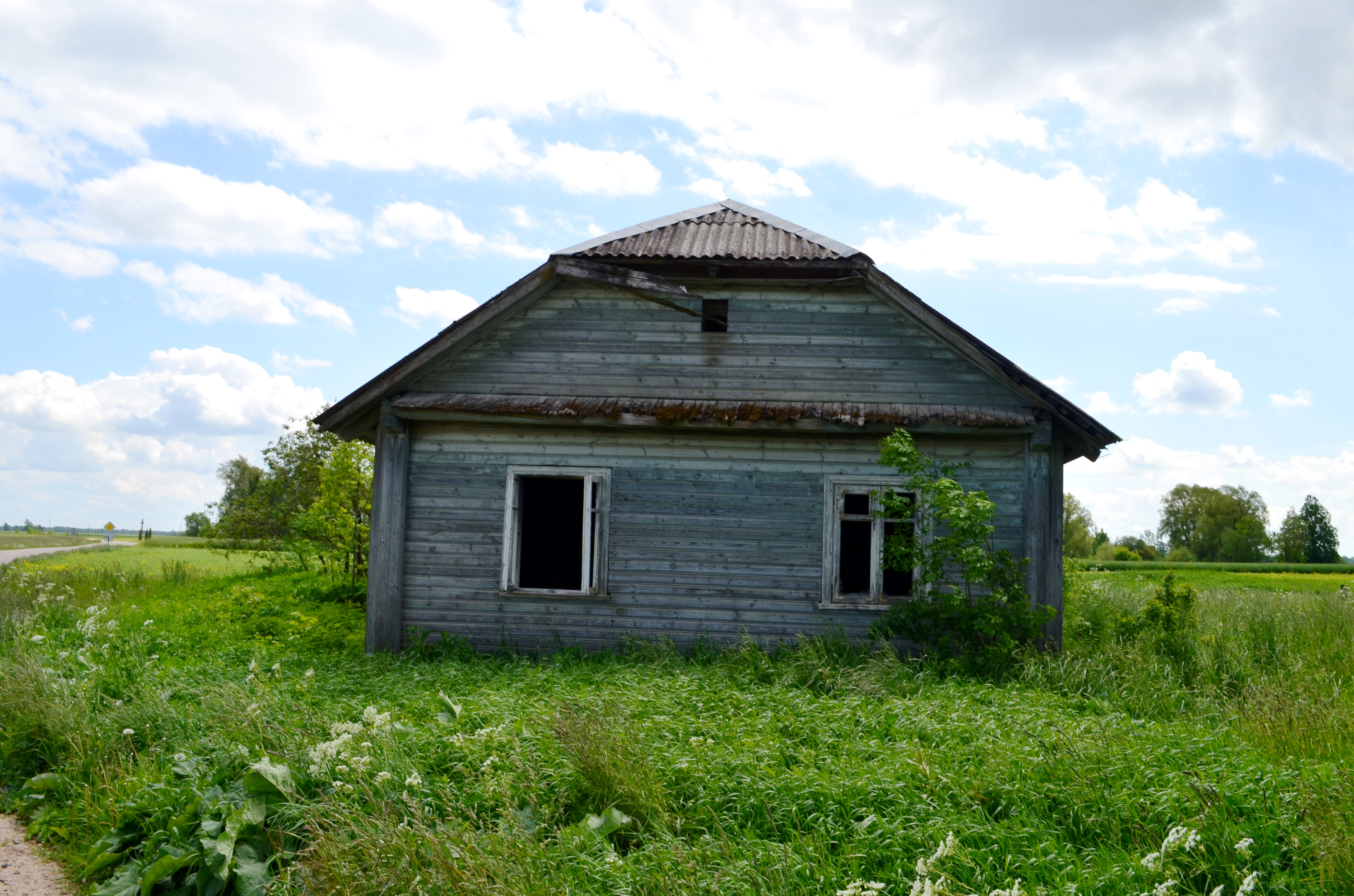 Kunigiškiai, Raguvos sen., Panevėžio raj.